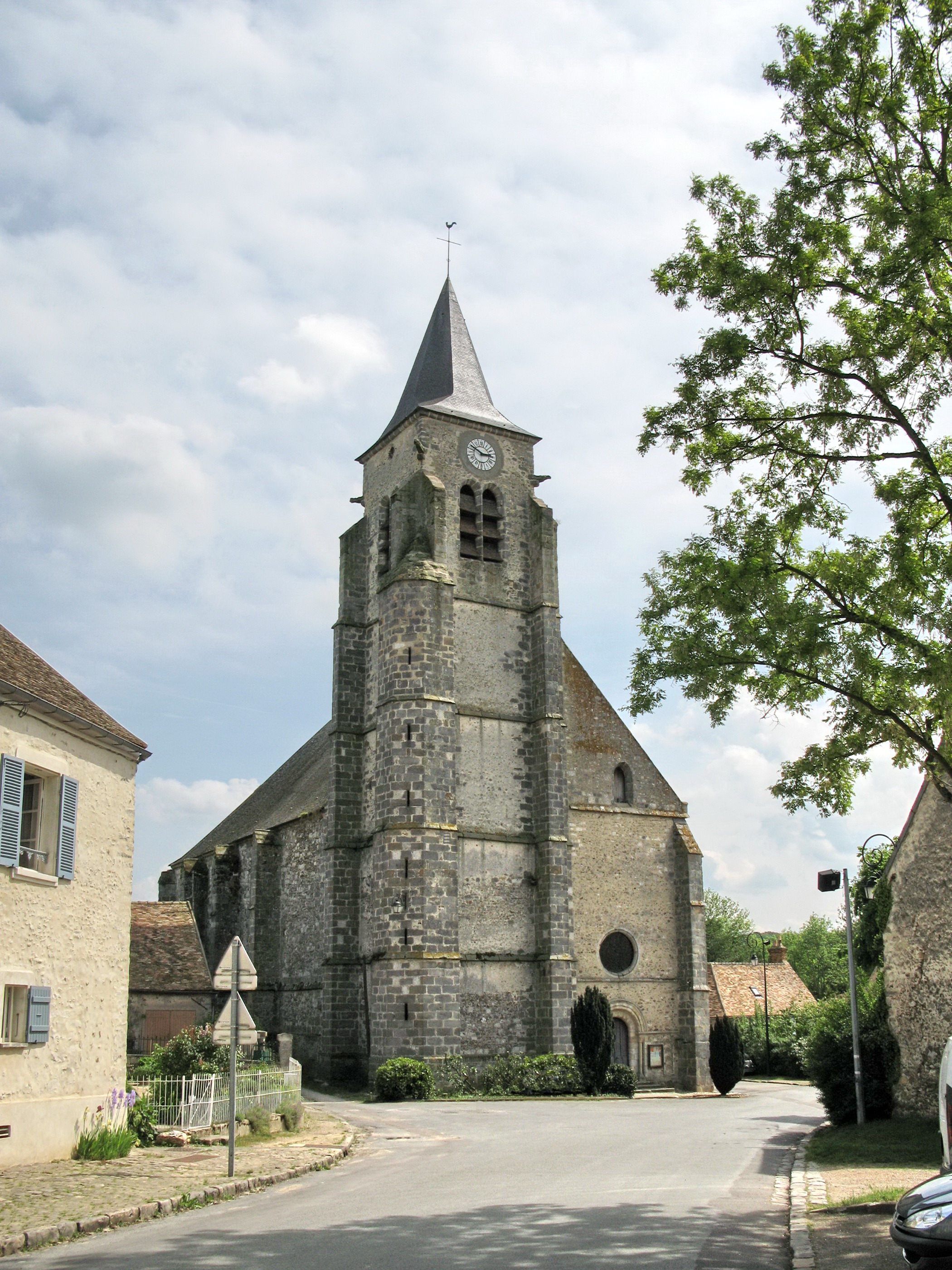 Eglise de la commune de Saint-Cyr-sous-Dourdan (Essonne)